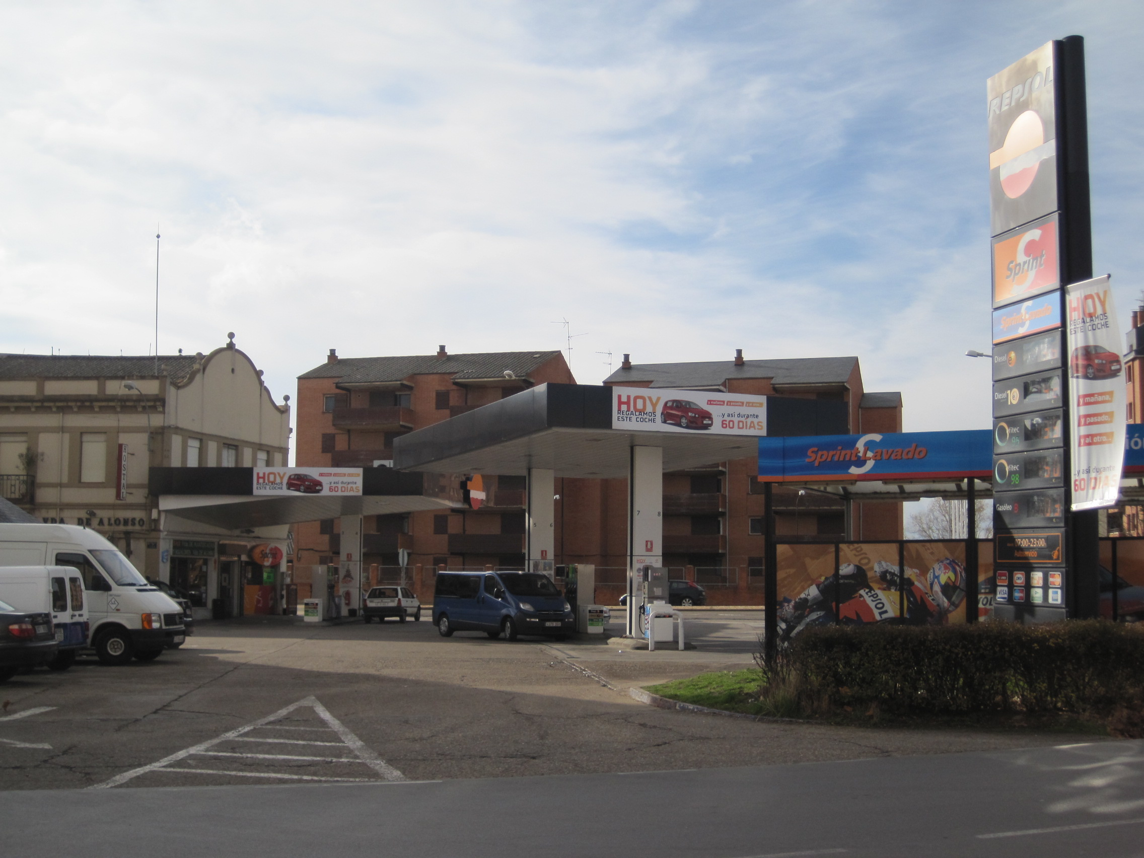 Gasolinera en Astorga (León, España).